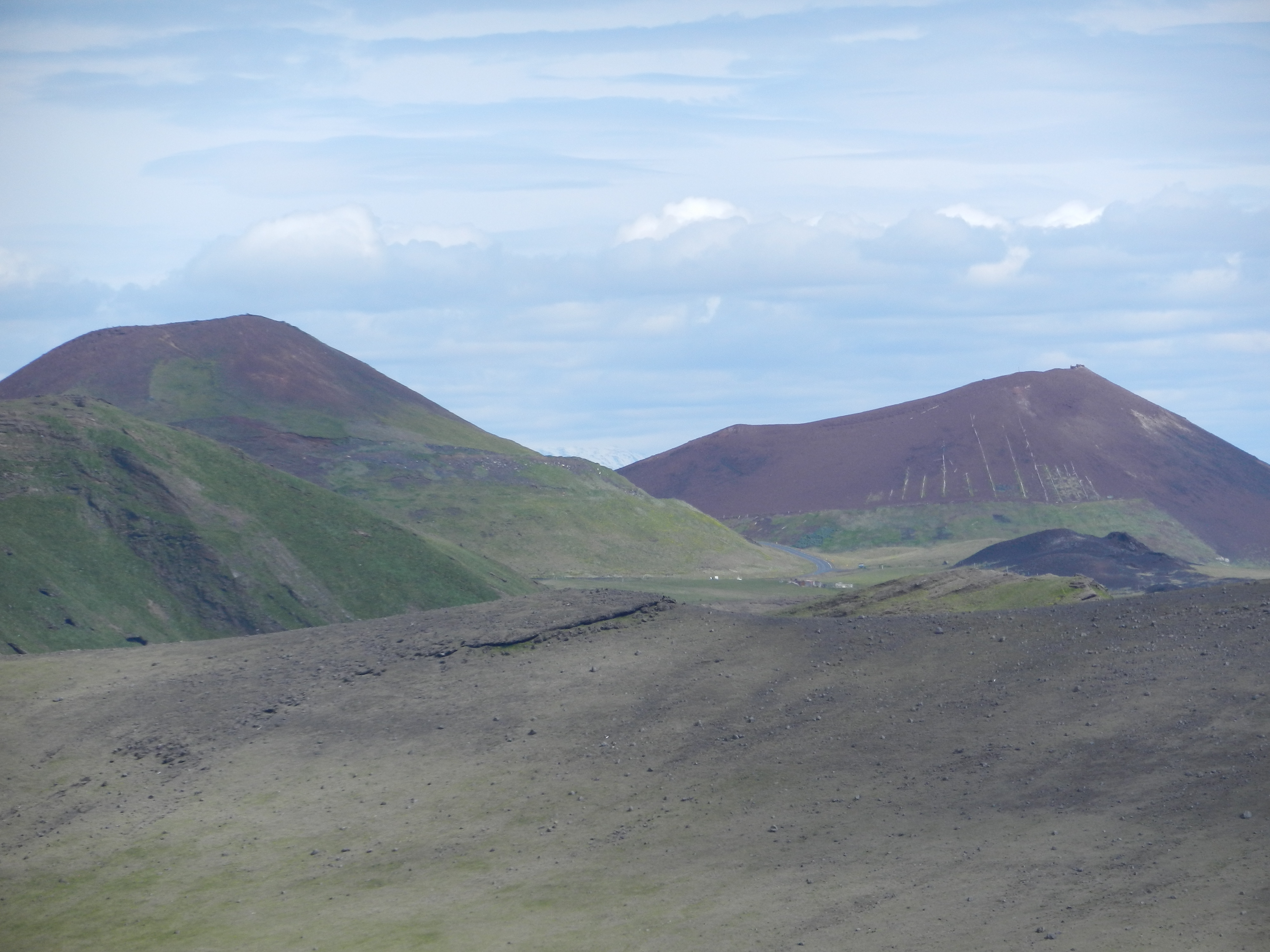 Vulkan Eldfell na otoku Heimaey, Vestmanski otoki, Islandija.